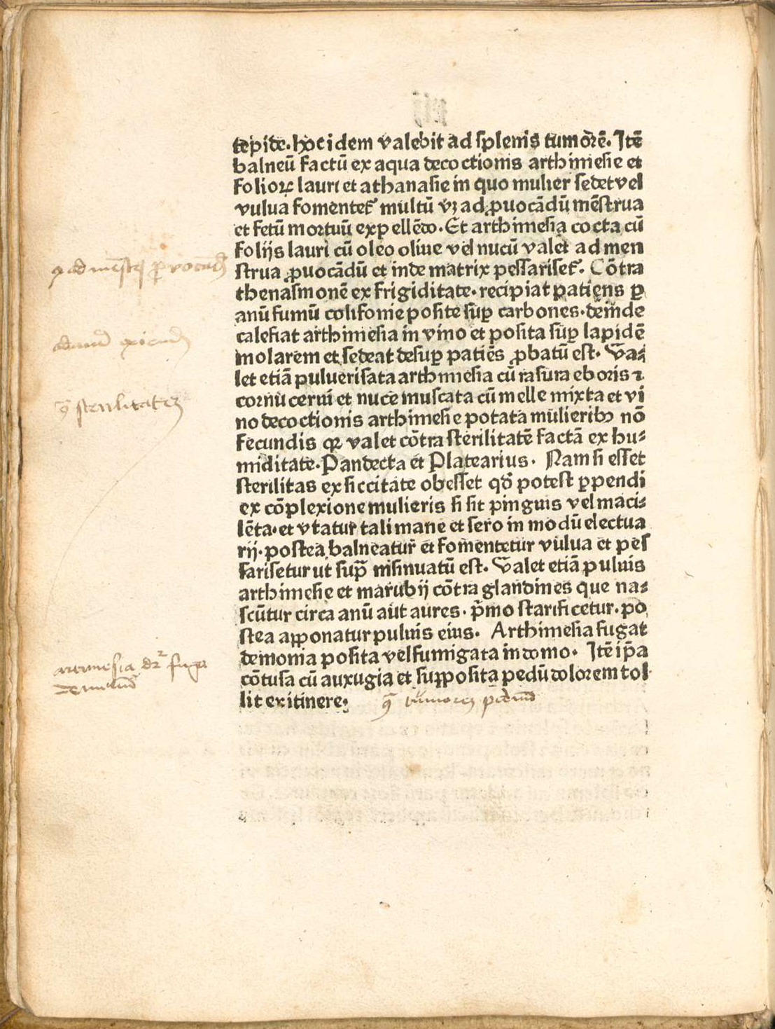 Kapitel XII, Beifuß, 2. Teil